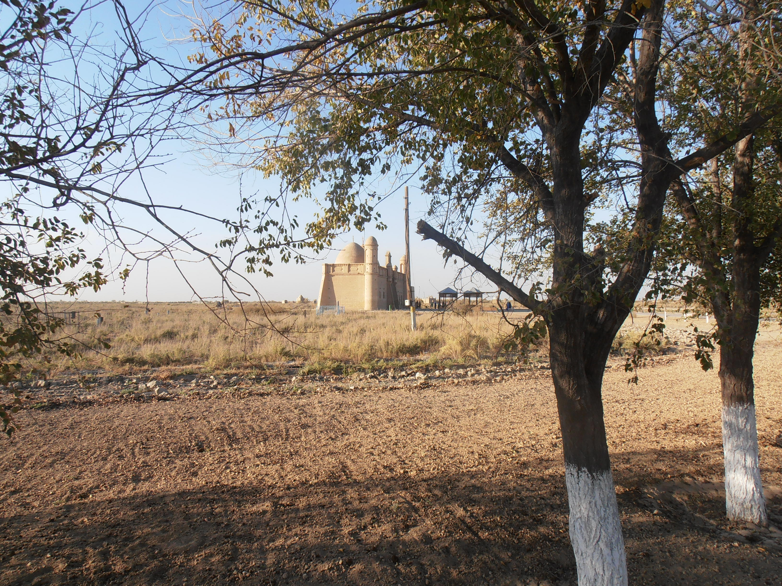 Вид слева на мавзолей Арыстан-баба (со стороны пешеходной дорожки).